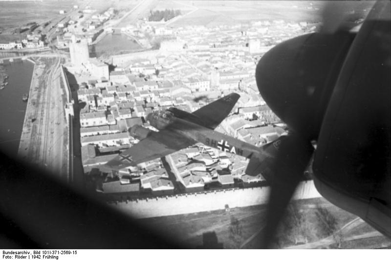 Information added by Wikimedia users.Junkers Ju 88 über der Stadt Aigues Mortes an der französischen Mittelmeerküste.